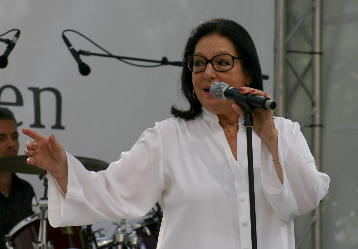 Die Sängerin Nana Mouskouri während eines Konzertes zum Tag der offenen Tür im Berliner Bundesfinanzministerium.